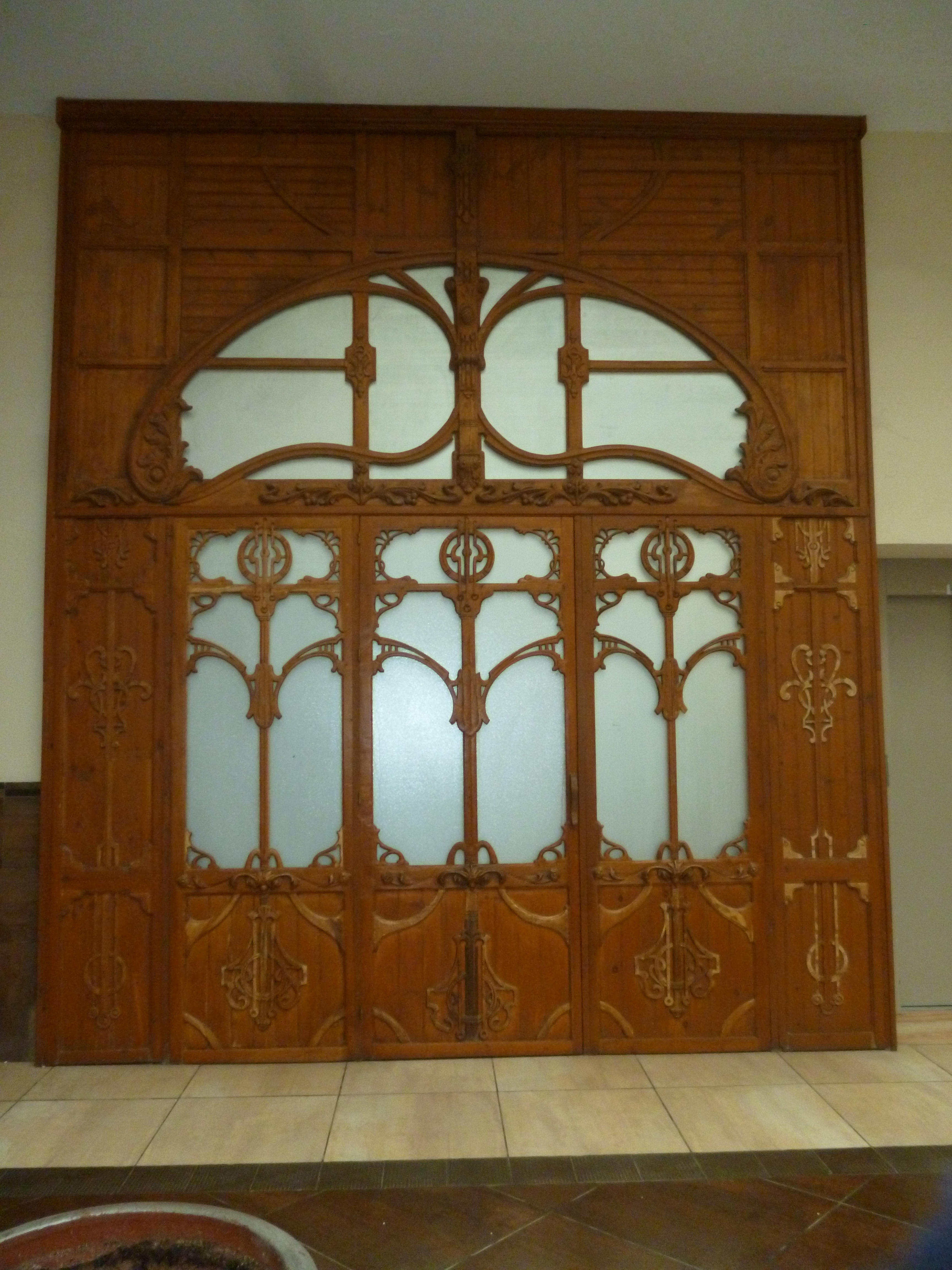 Colegio del Buen Consejo